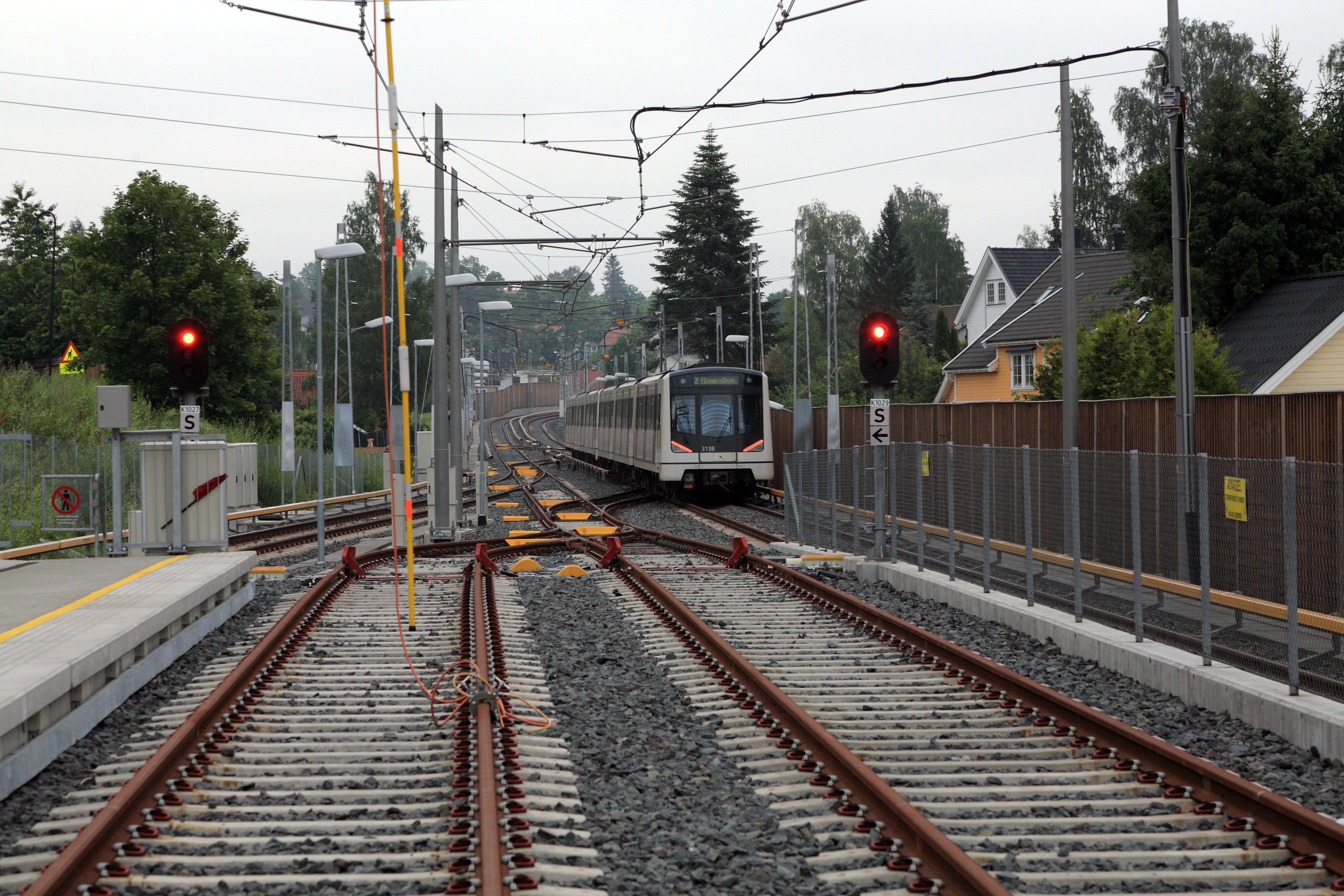 Niederflurbahnsteige für den Straßenbahnbetrieb. Bis zu diesem Bahnhof sollen die Züge der Lilleakerbahn verkehren. Sämtliche Weichen sind mit beweglichen Herzstückspitzen ausgerüstet, im Gegensatz zum Zustand vor dem Umbau gibt es nur noch Einfachfahrleitung. Die Gleissperren dienen dem Flankenschutz und ersparen eine Zwieschutzweiche. Zug der Linie 2 Richtung Oslo, Nachschuss.